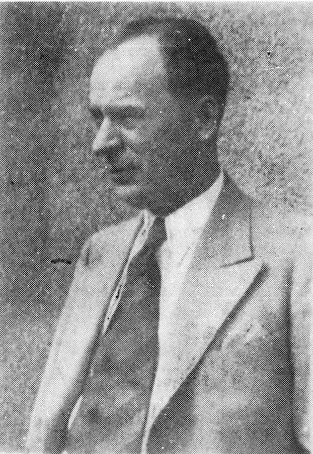 Jan Łangowski